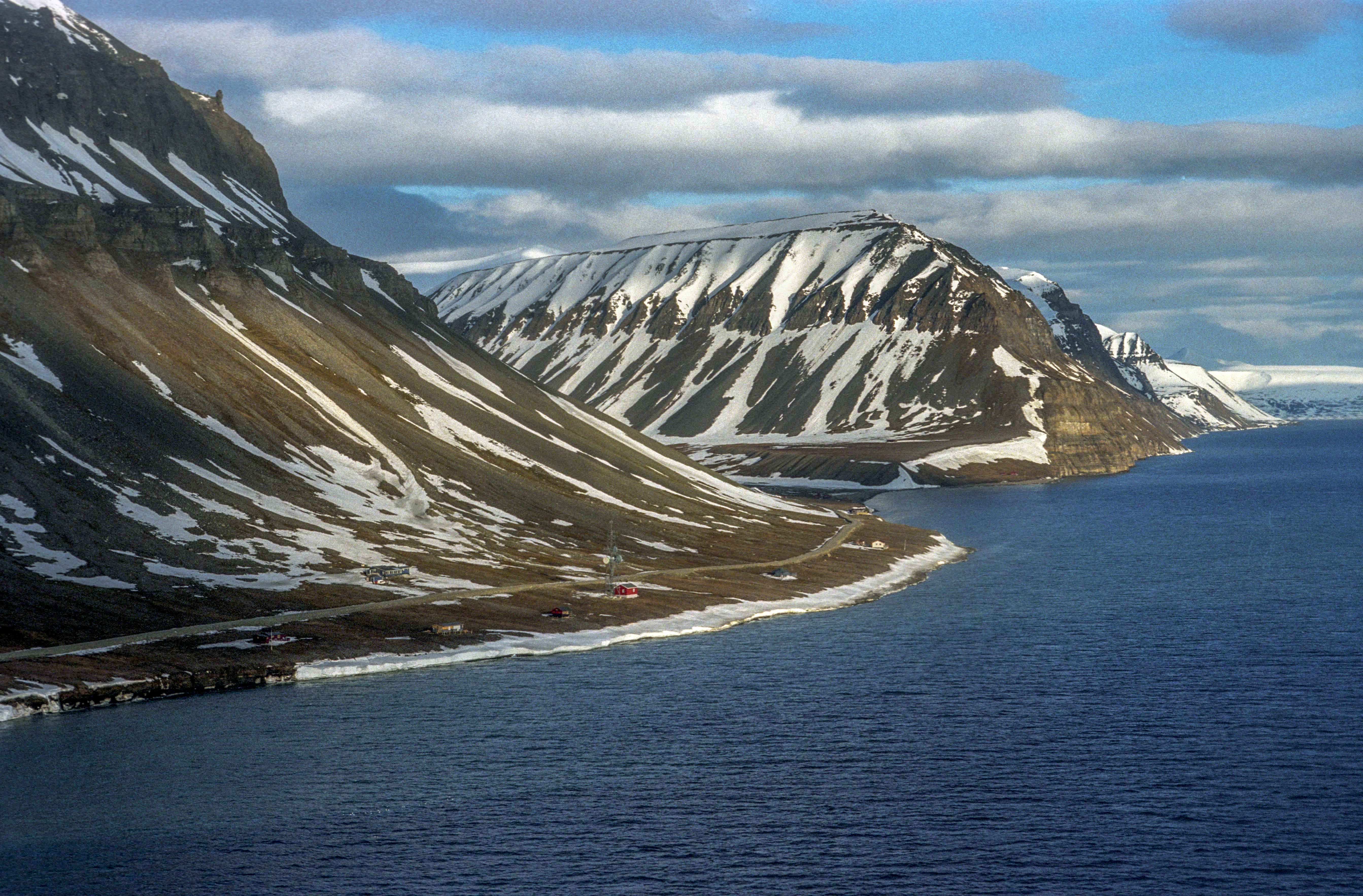 Svalbard, Isfjorden. This is not Barentsburg, it is Hotellneset (left), Björndalen (middle) and Fuglefjella (right), just west of Longyearbyen.